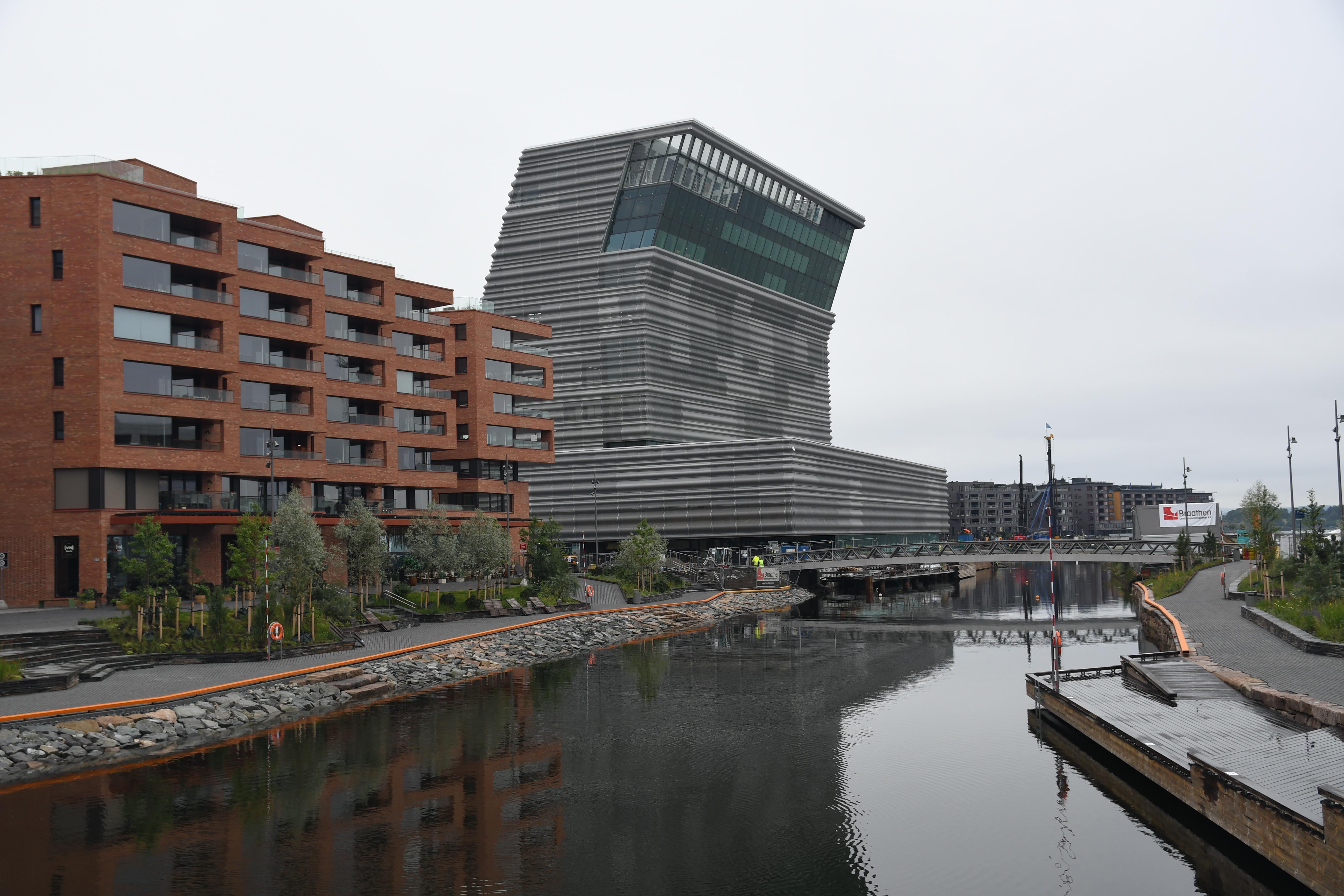 Lambda, Munchmuseet som åpner i 2020, med Akerselvallmenningen og Munchs brygge til venstre